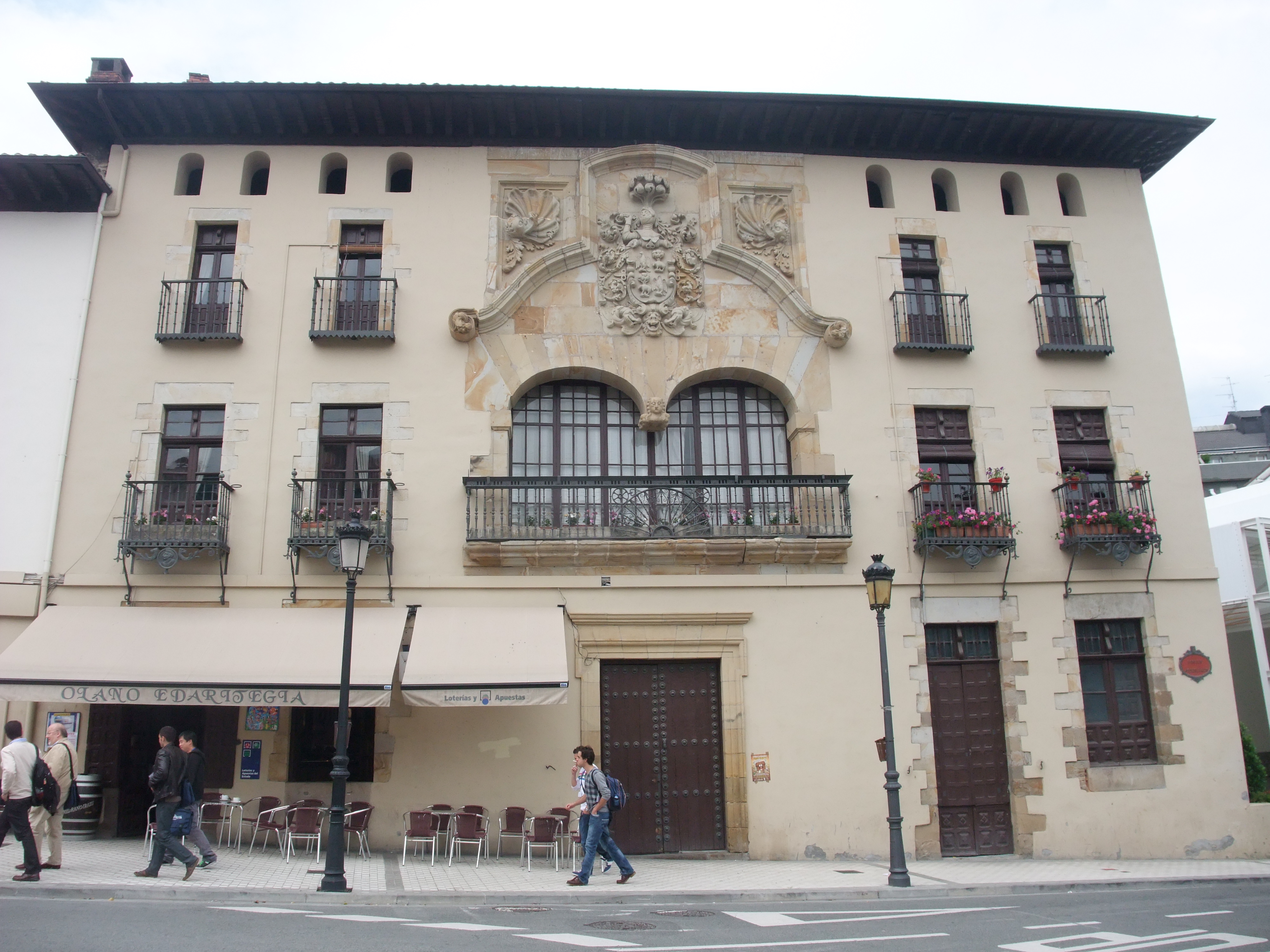 Ordizia (Guipúzcoa)-Palacio Zabala-1